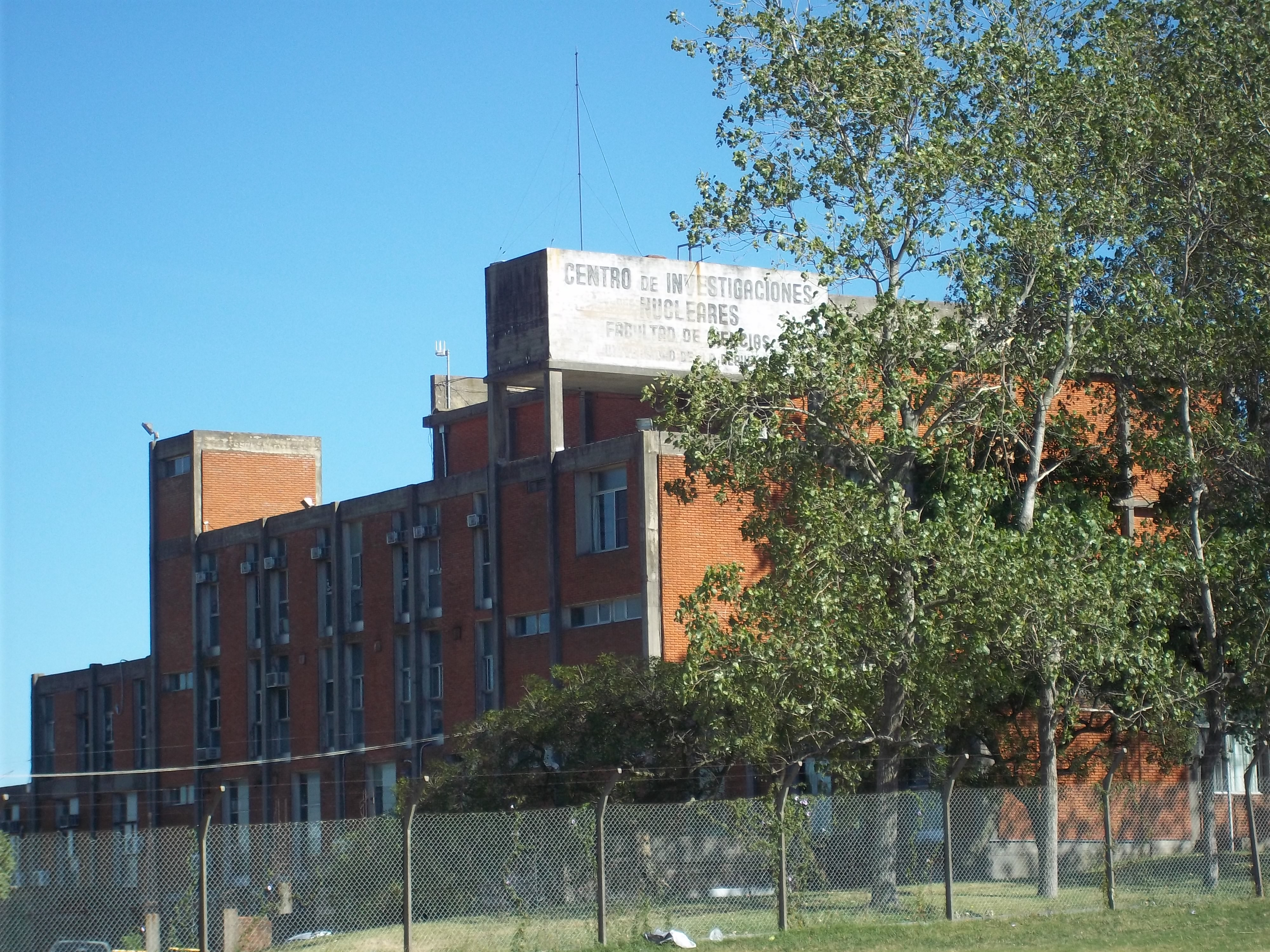 Centro de Investigaciones Nucleares, en Malvín Norte (Montevideo, Uruguay)